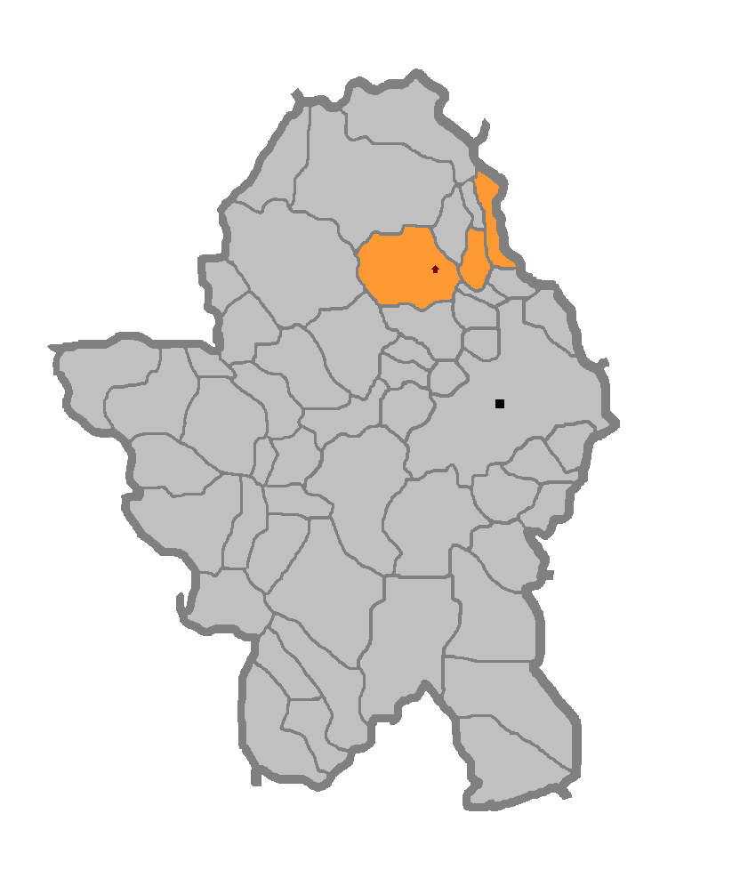 Мјесна Заједница Драгочај